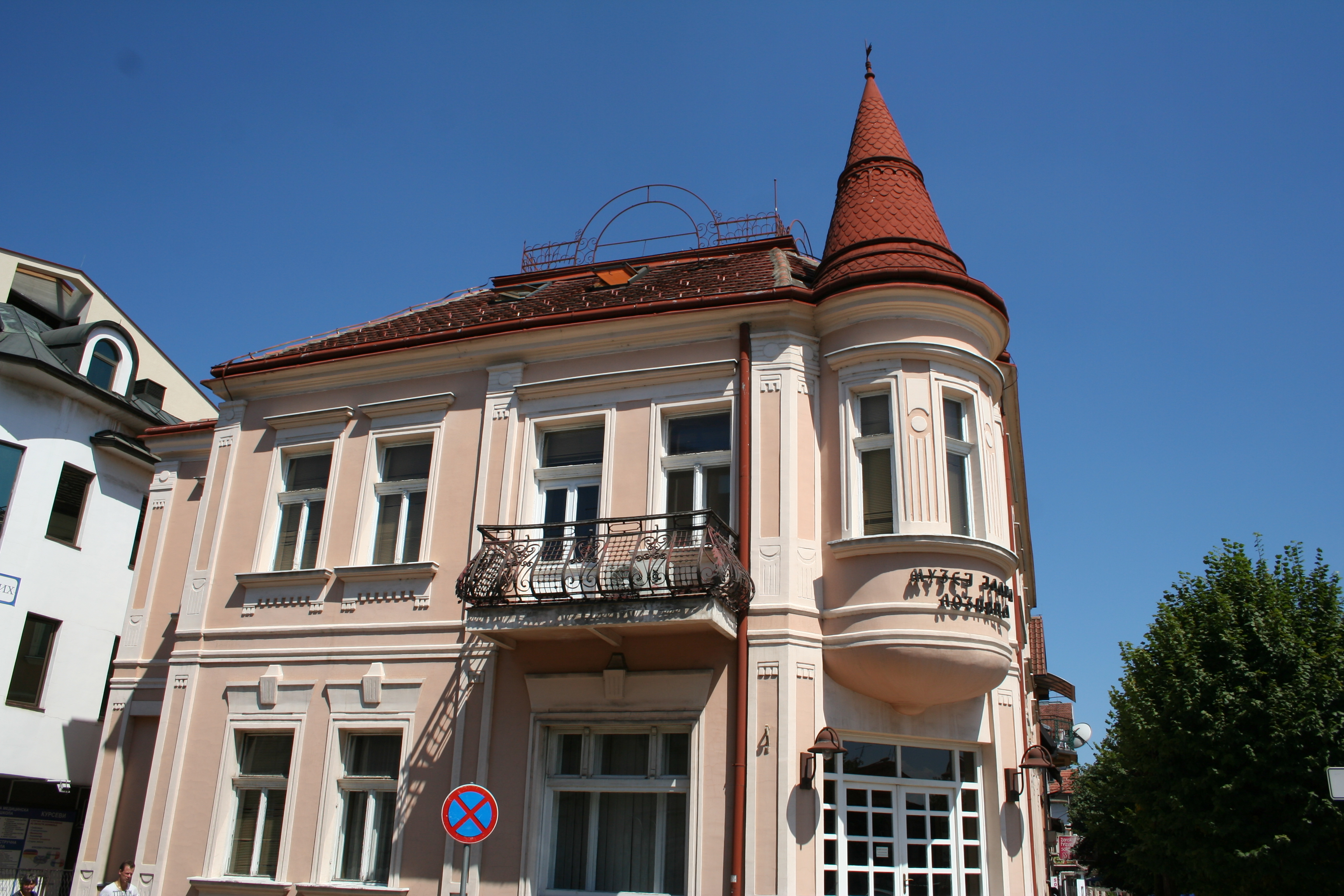 Stara apoteka (Muzej Jadra), Loznica